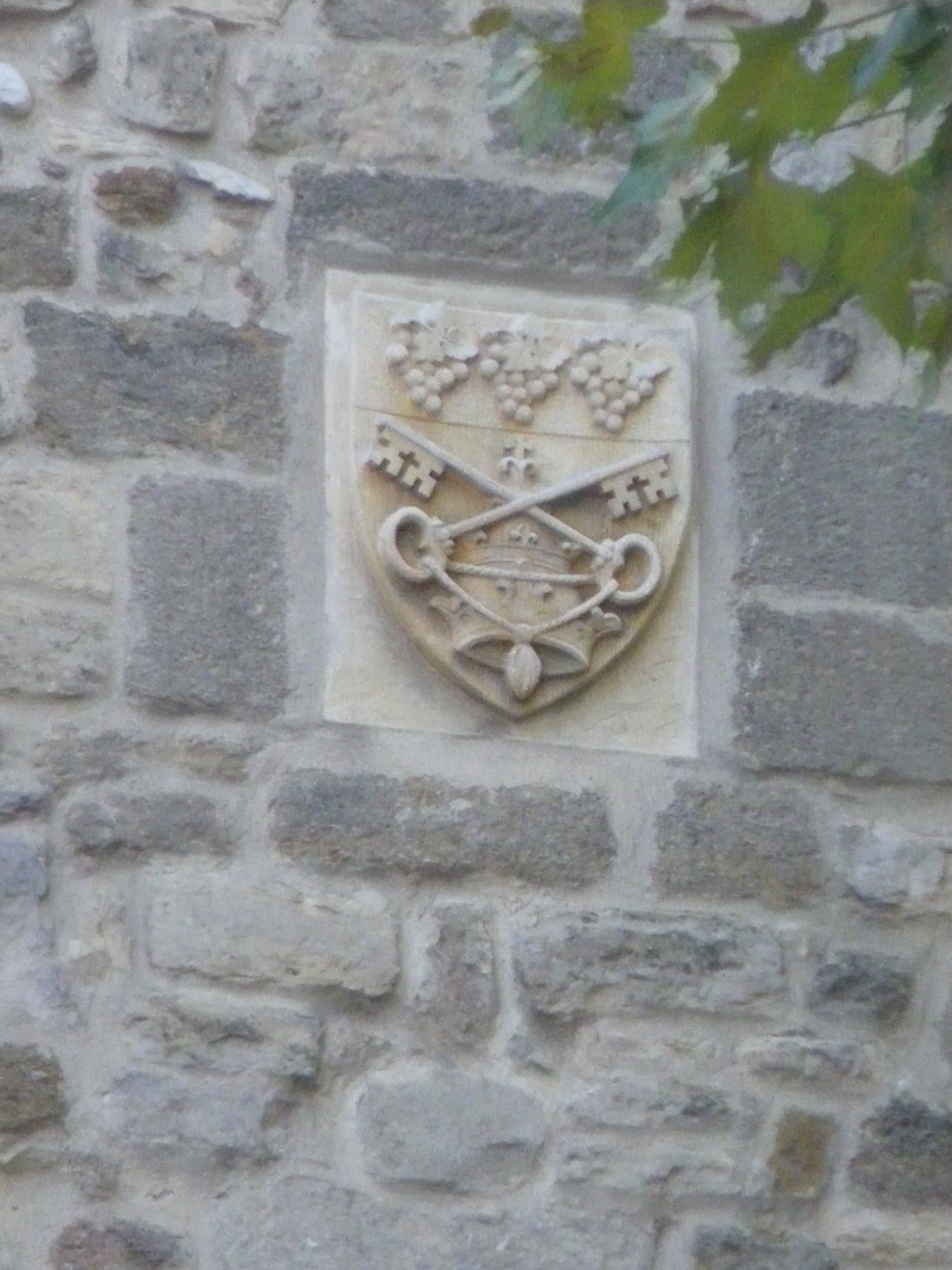 Blason de Sainte Cécile les Vignes, Vaucluse